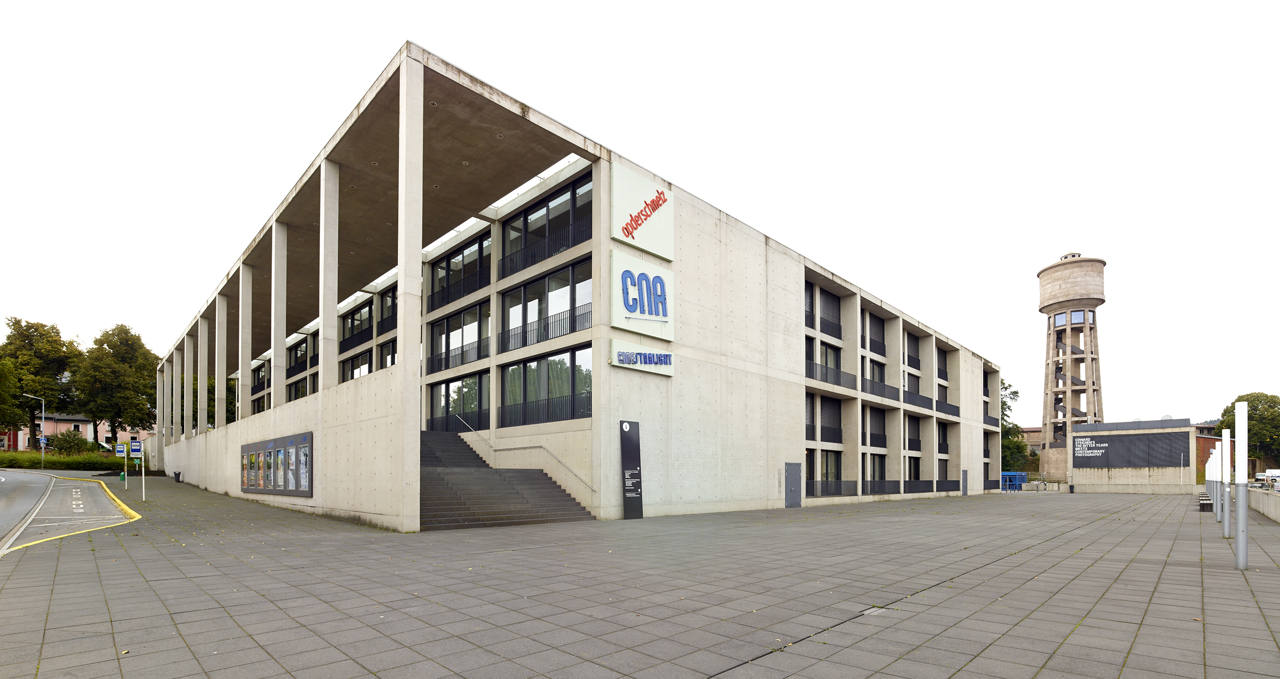 Le bâtiment du CNA et l'ancien château d'eau